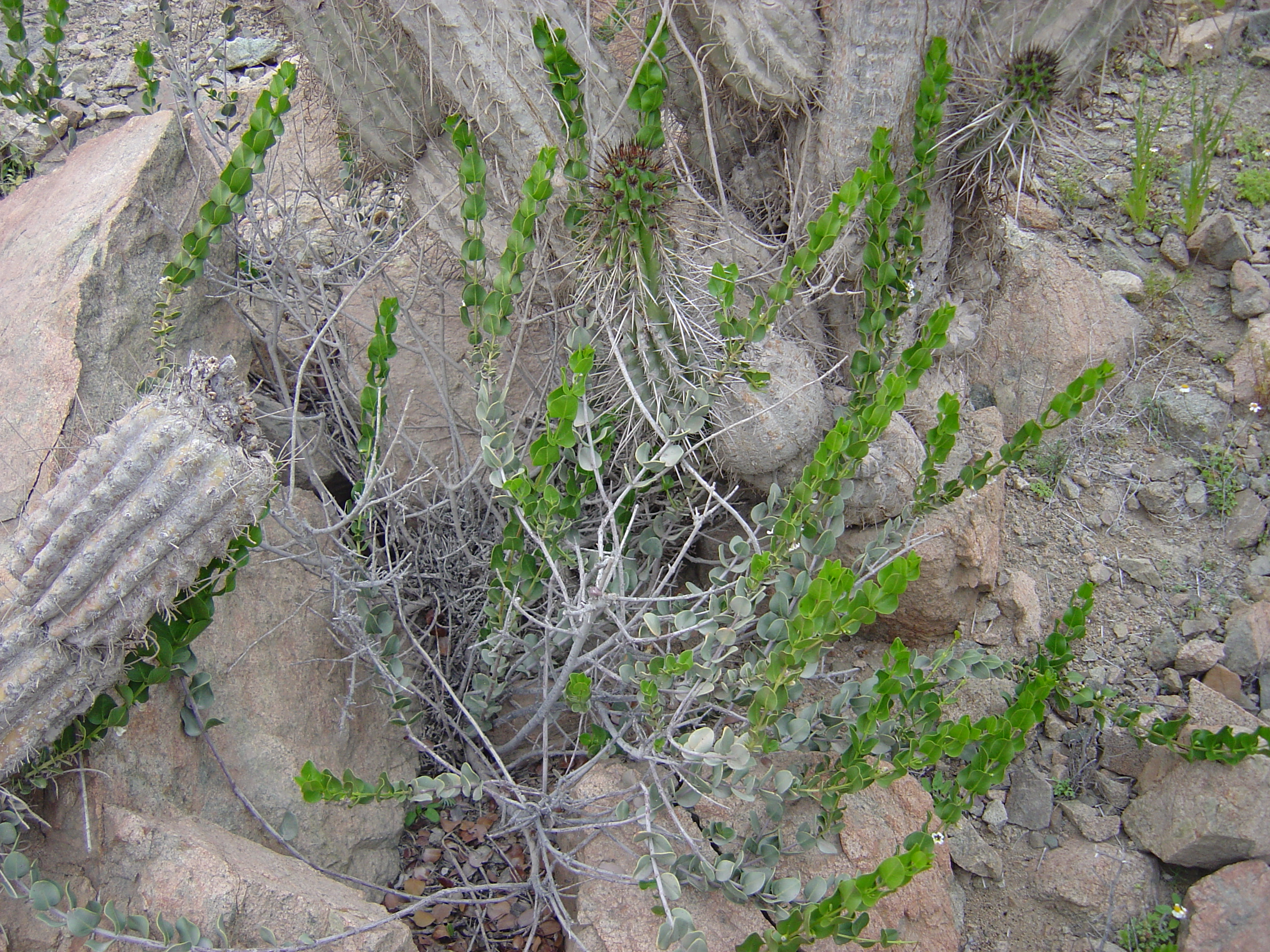 Monttea chilensis var taltalensis Reiche 6